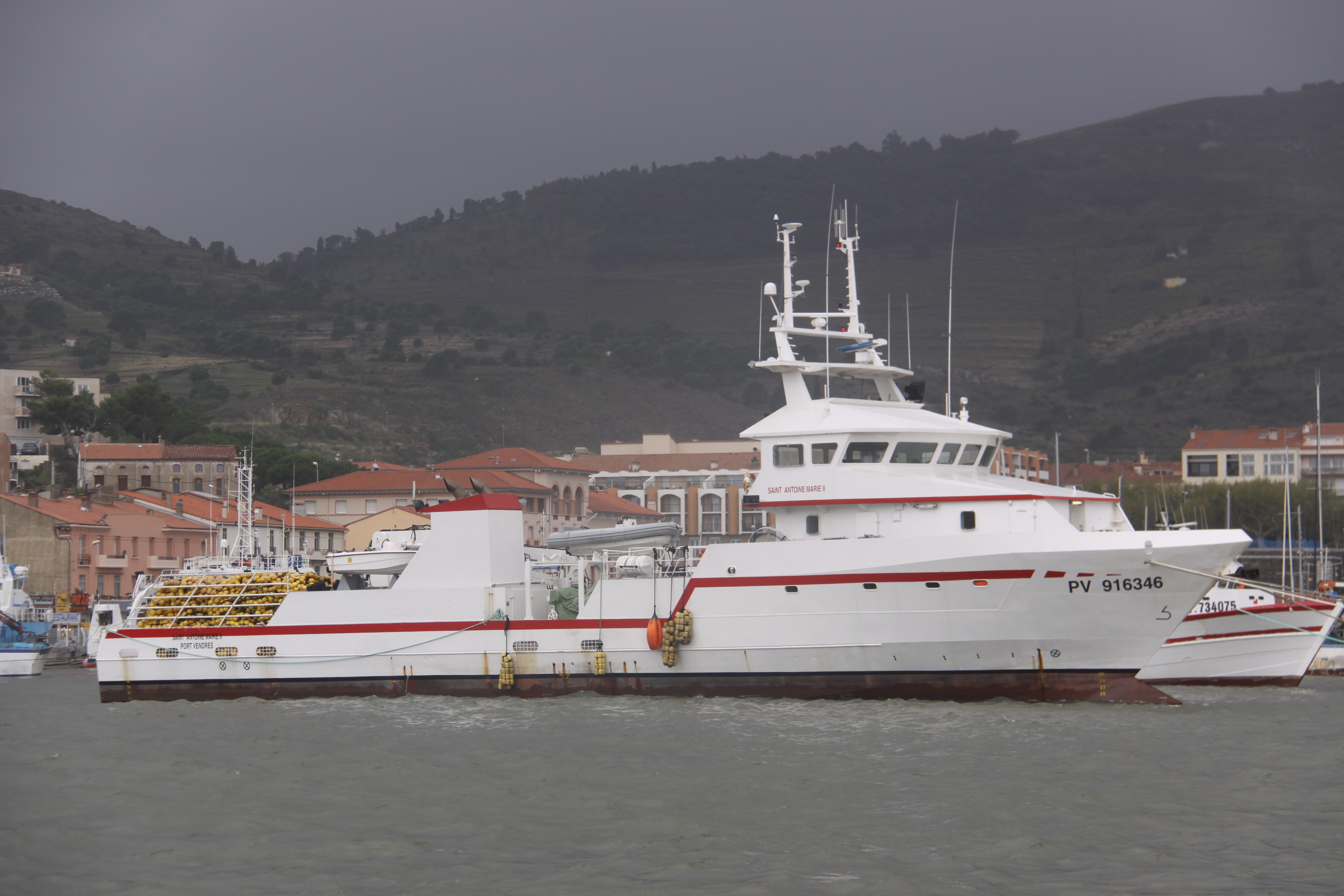 Le thonier-senneur "Saint Antoine Marie II" a été construit en 2004 aux chantiers Piriou de Concarneau. Il mesure 43,10 mètres de long et 9,50 mètres de large. Il est équipé de deux moteurs de 400 kw. Il a des installations frigorifiques consistant en 5 cuves à poisson d' un volume total de 253 m3 et des machines à fabriquer la glace (glace écaille et liquide). Immatriculation: PV 916346. Port-Vendres, Pyrénées-Orientales, France.